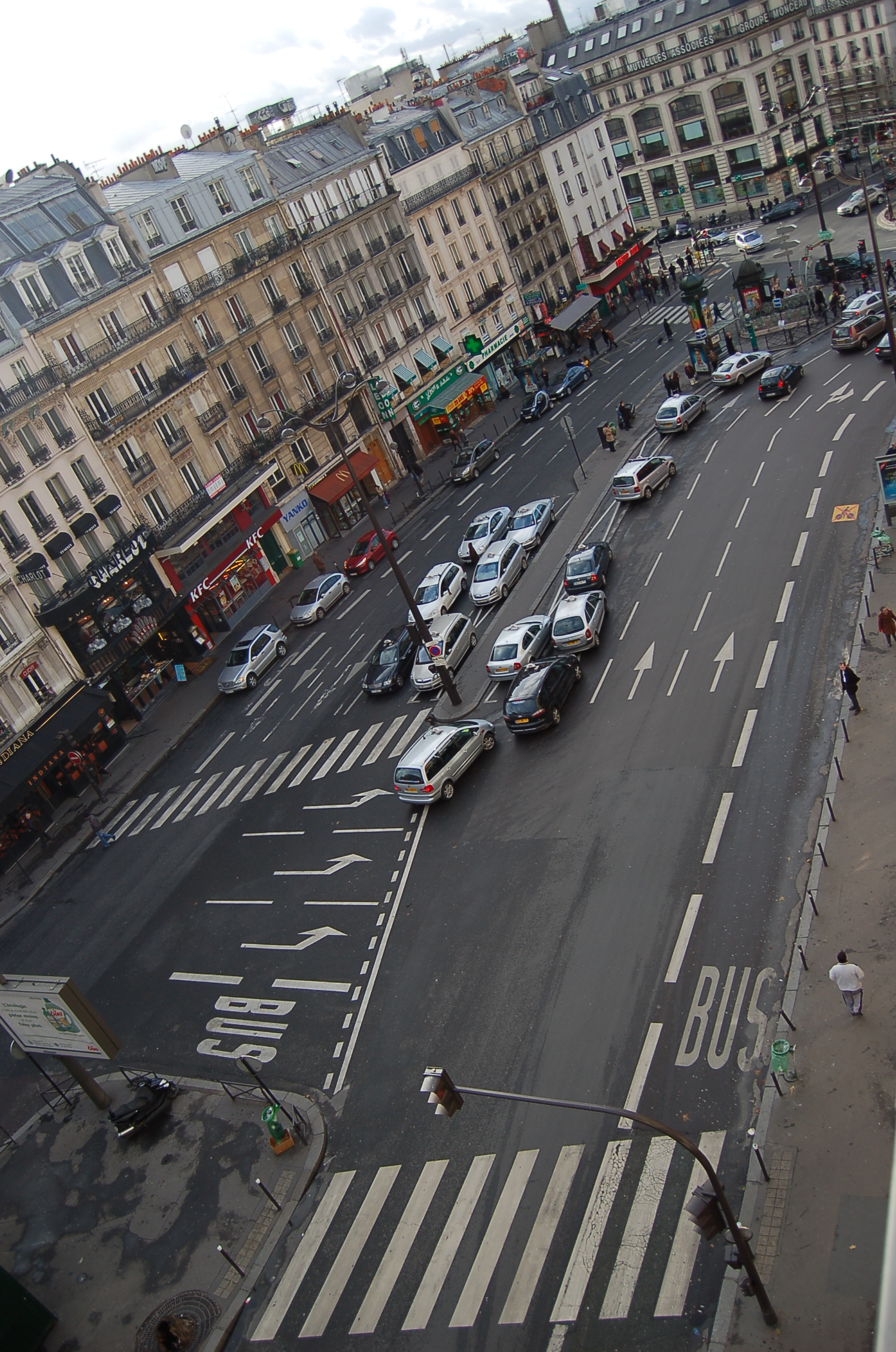 Place de Clichy, Paris 9ème, France.